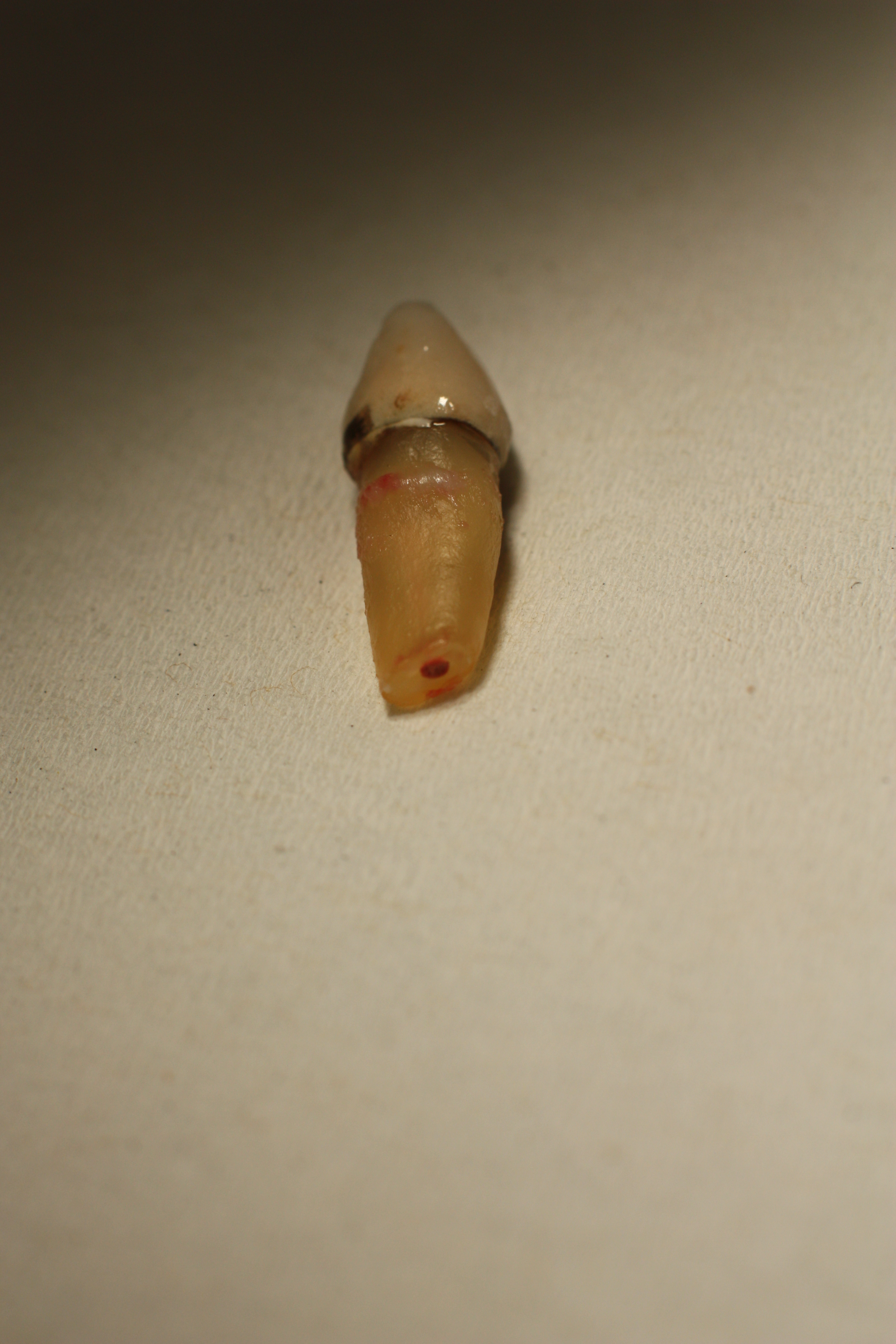 Wurzelkappung